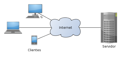 Diagrama descrevendo o modelo cliente-servidor